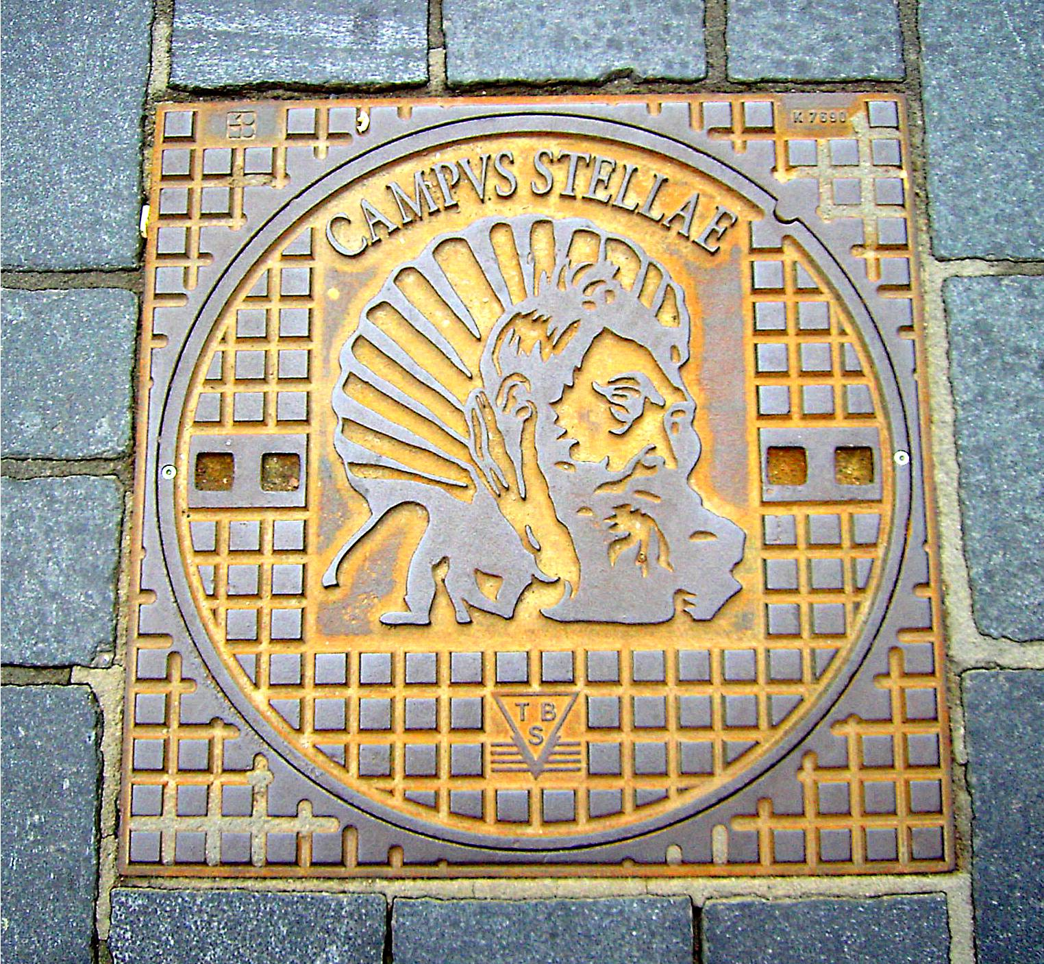 Groenewoud & Buij,2001